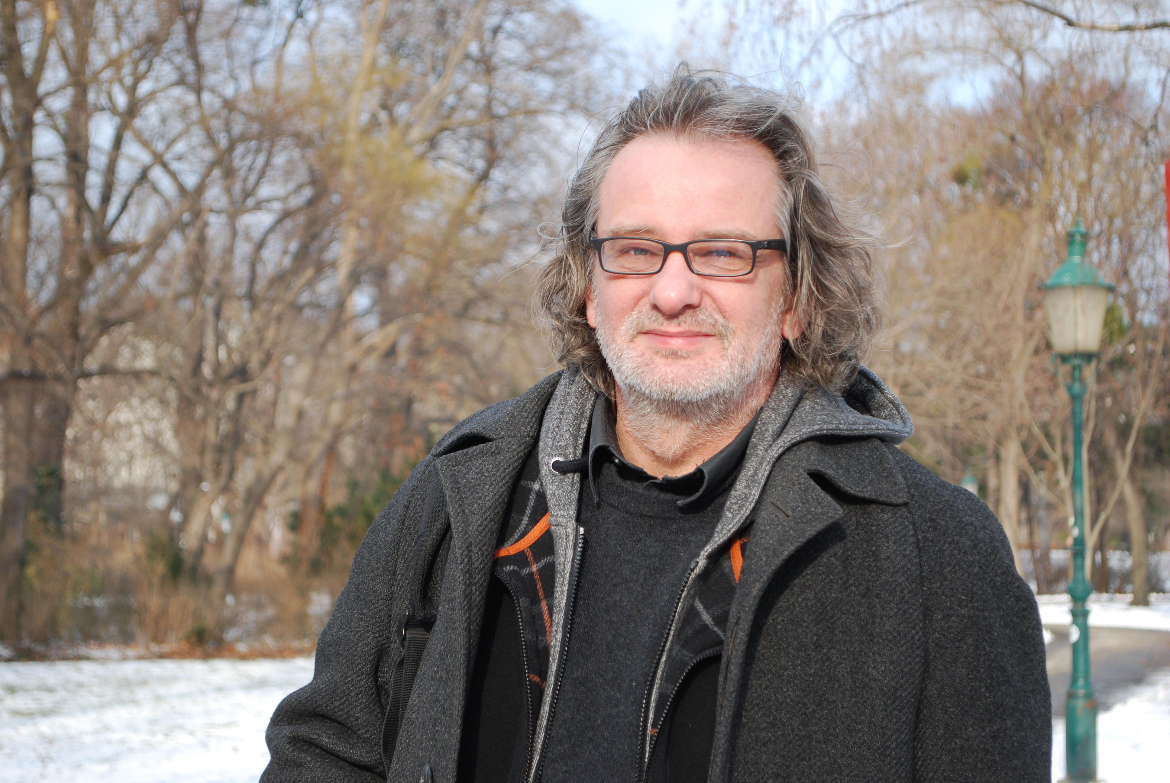 Christian Vizi, Filmproduzent, Portrait